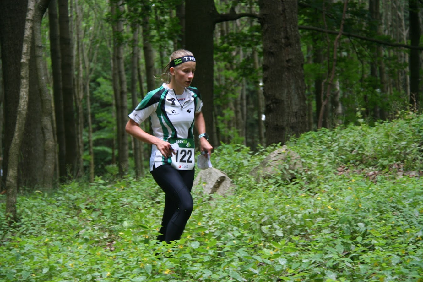 MČR KT 2018